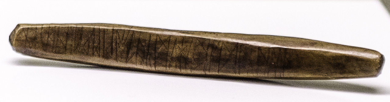 Taxushout met runeninscriptie uit de 8e eeuw, afkomstig uit de wierde van Westeremden. Drie inscripties: 'op haemu jibada aemluþ; iwi ok up dunale; wimoed aeh þusa', wat betekent: 'Op het heem blijve goed geluk, mag het groeien bij de taxus. Wimoed bezit dit.' Een soort gelukstoktje voor de eigenaar Wimoed dus.